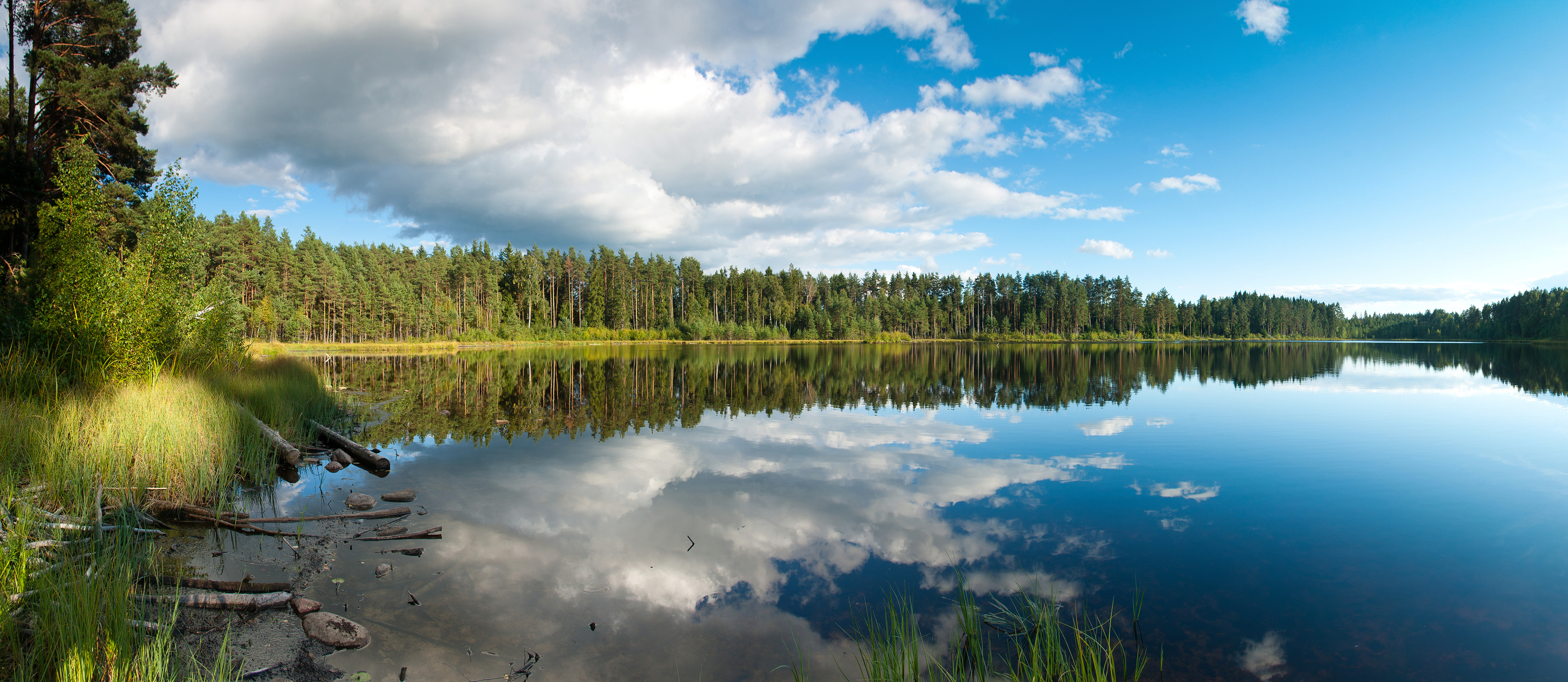 Ahitsõ ehk Ahitse järv Rõuge vallas